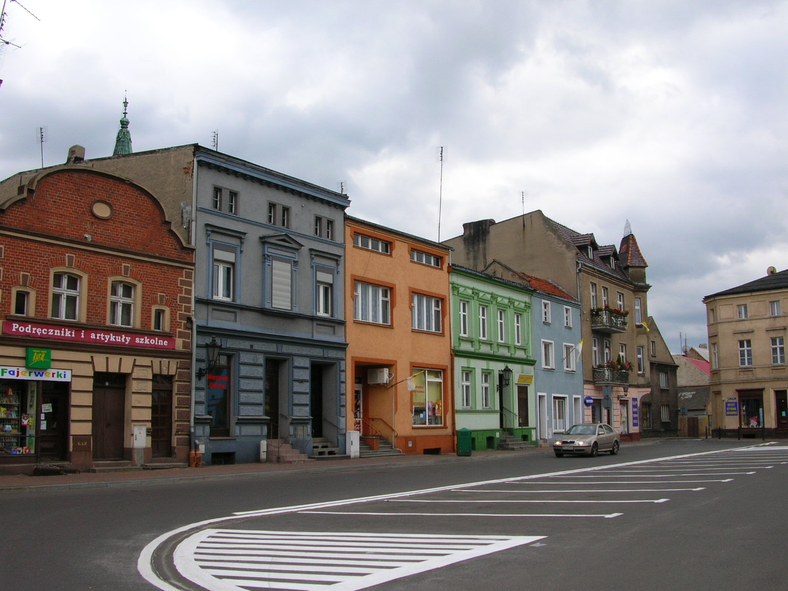 Poniec - Rynek Autor - Bartek Wawraszko